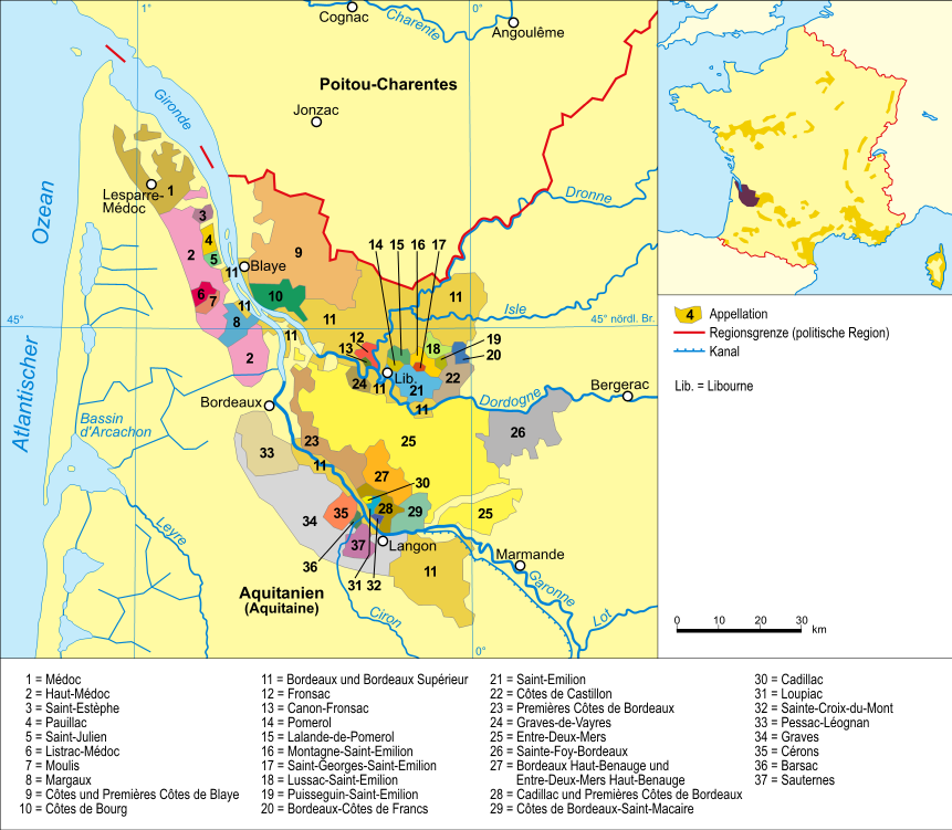 Bildbeschreibung: Karte Weinbaugebiet Bordeaux Quelle: selbst erstellt Zeichner: Domenico-de-ga Datum: 24. Mai 2006